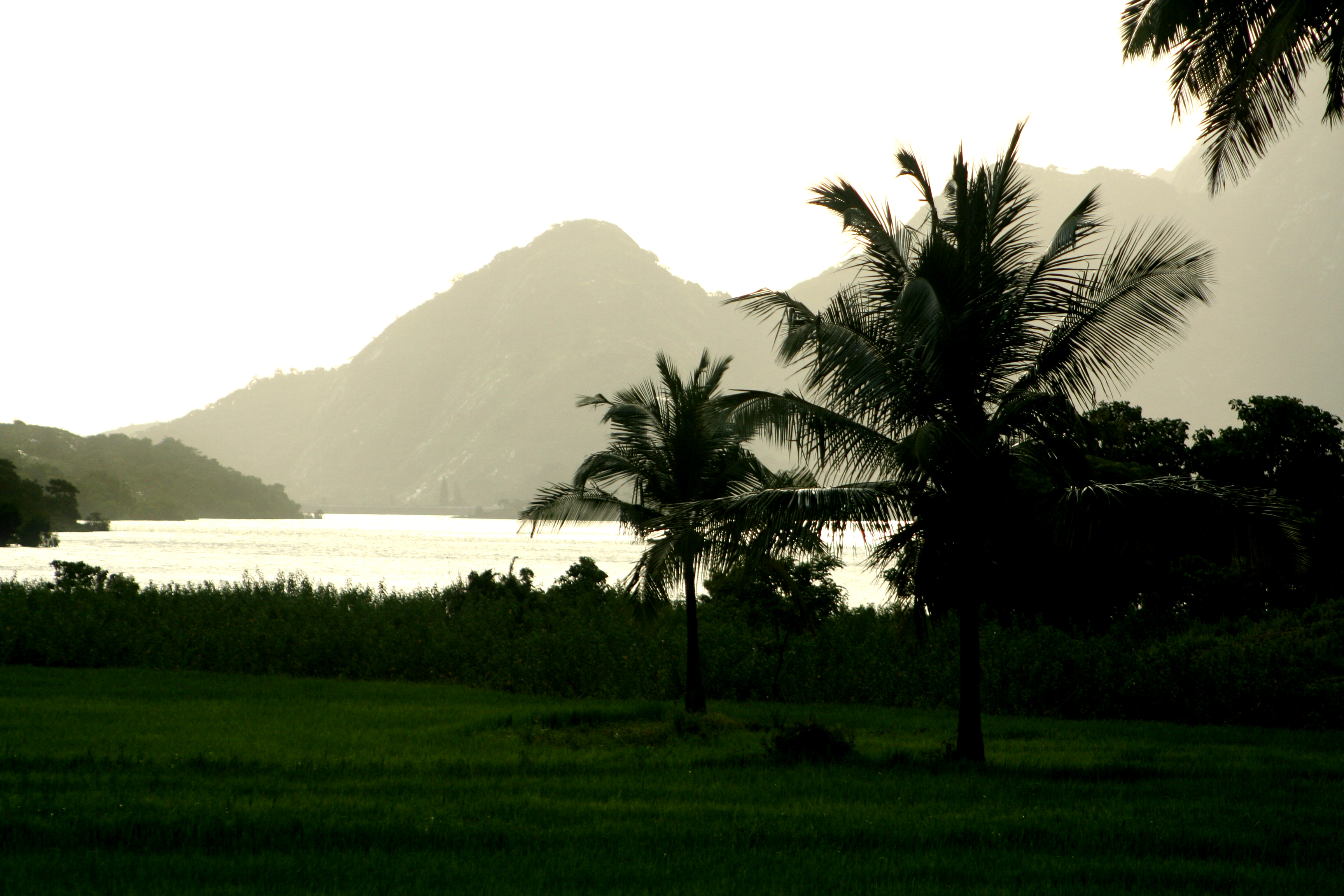 This media file is uploaded with Malayalam loves Wikimedia event - 3.